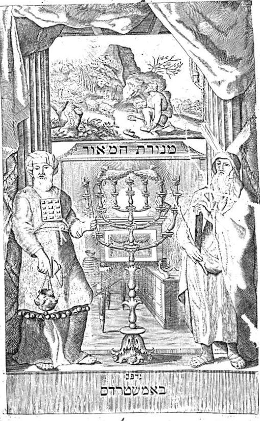 שער מנורת המאור אמשטרדם תפ"א 1721